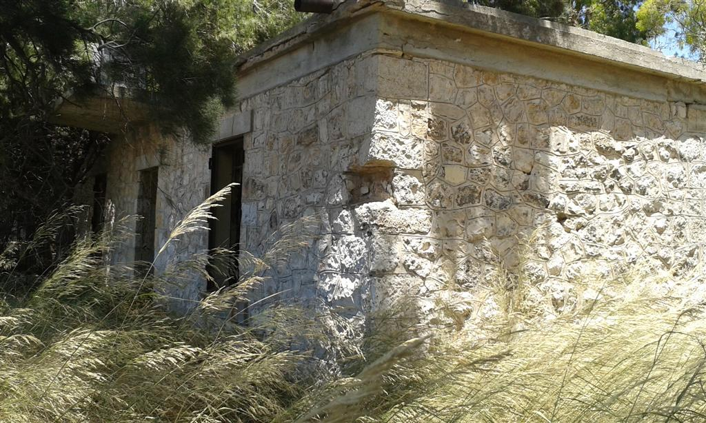 תחנת הרכבת דיר סניד - בנין ראשי